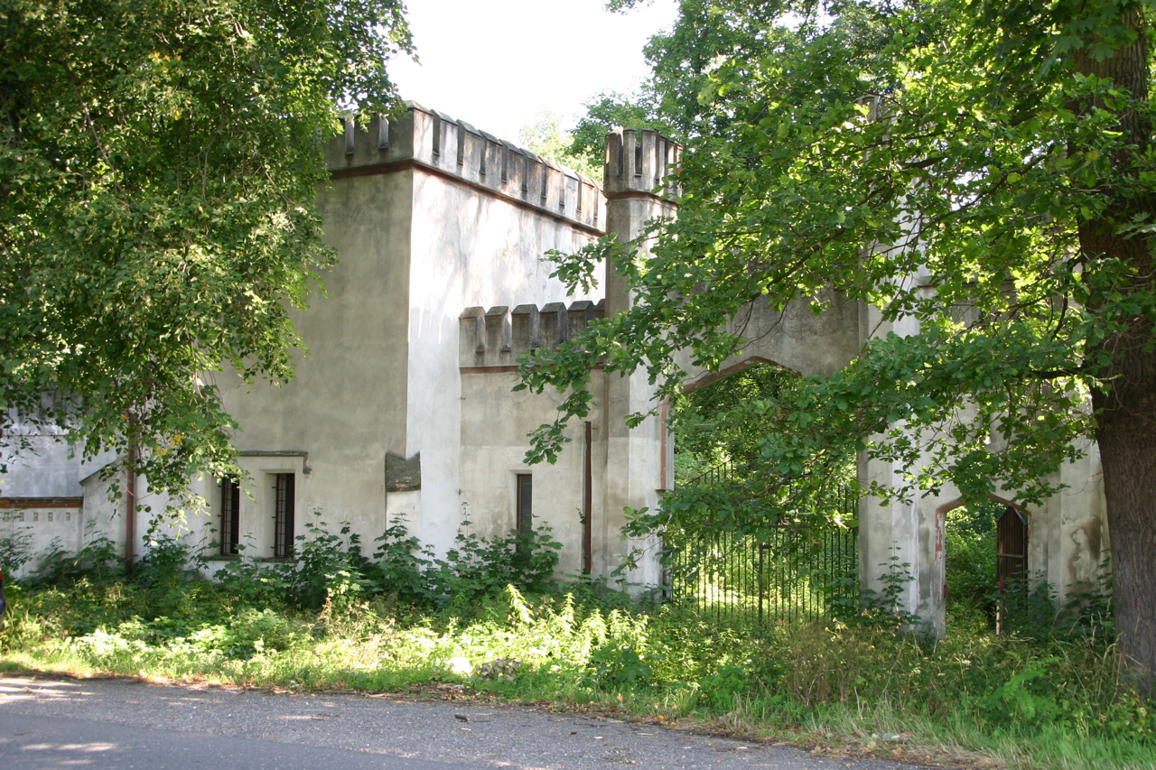 Budynek bramny, parku przy pałacu w Dobrej. Krenelaże.